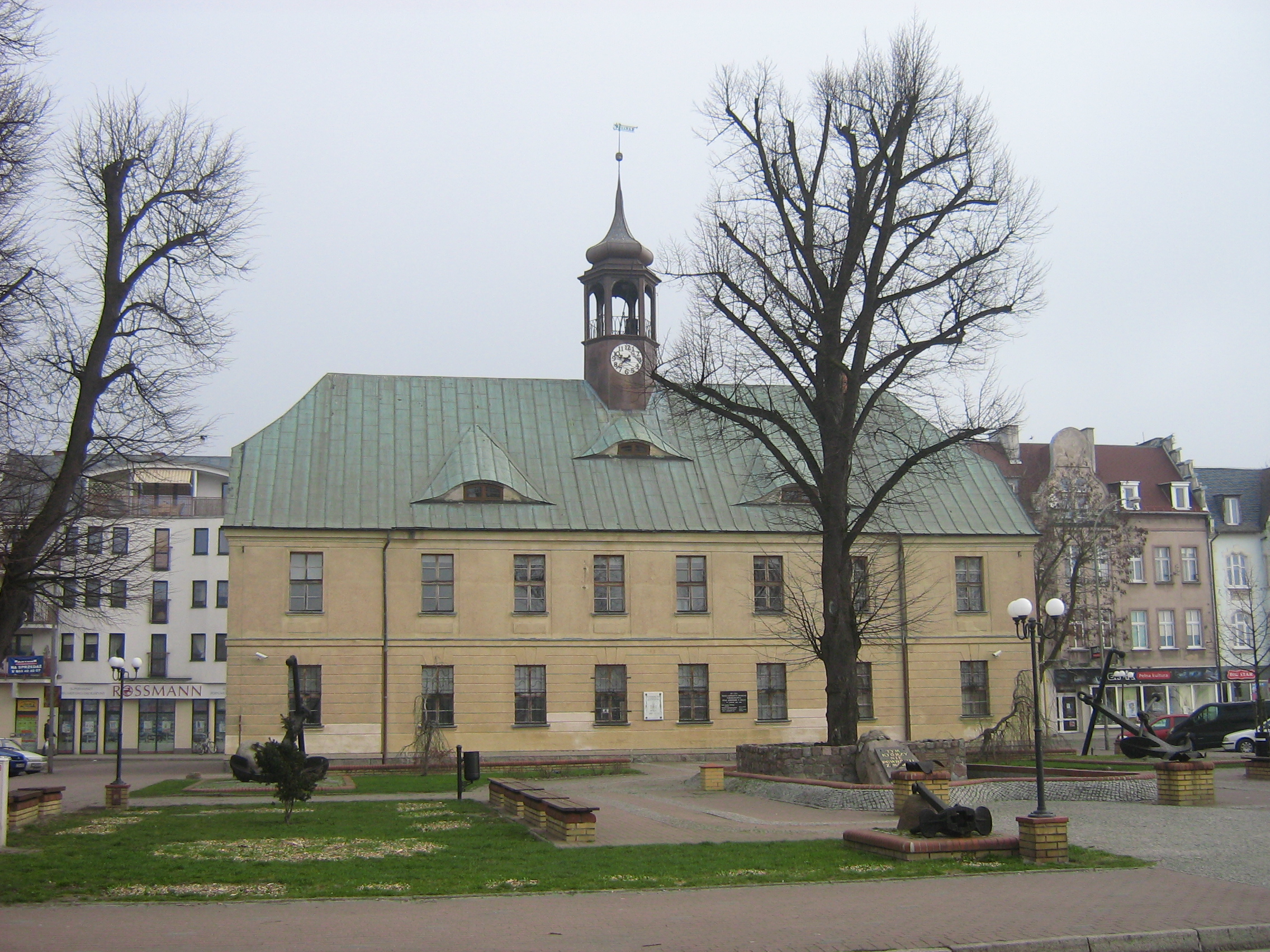 Muzeum Rybołówstwa Morskiego w Świnoujściu